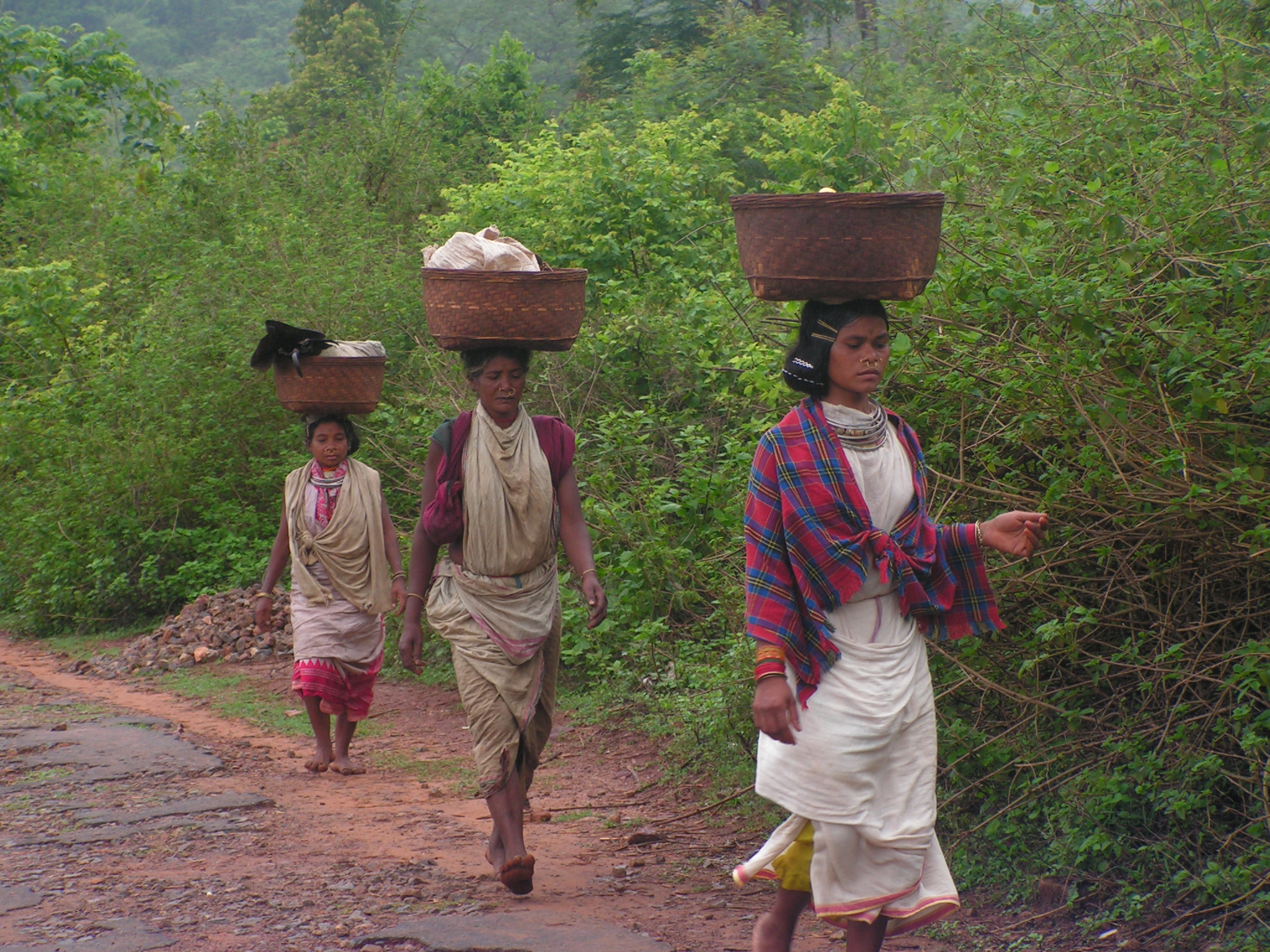 Indigene Frauen auf dem Weg zum Markt um ihre Ware zu verkaufen.